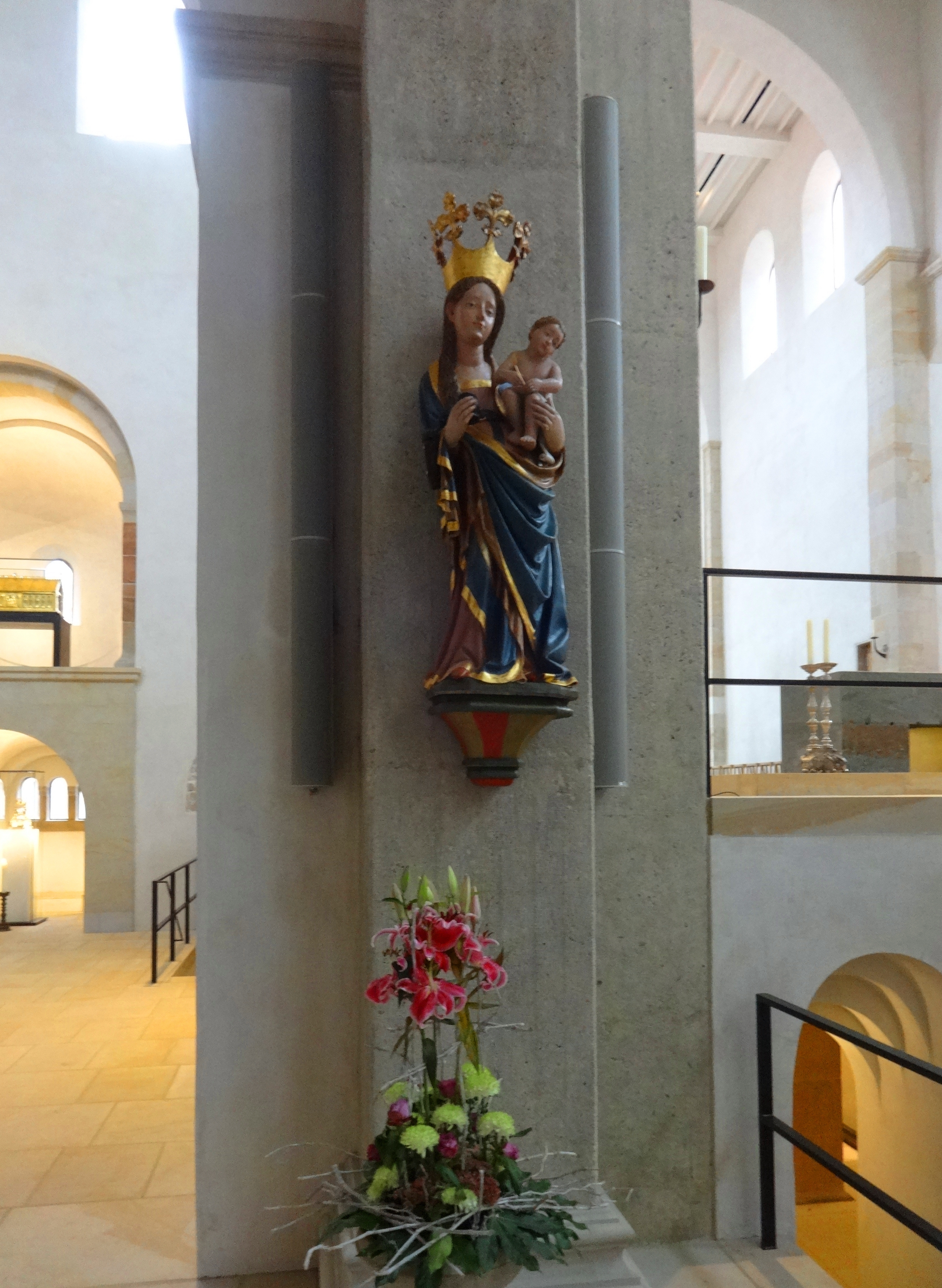 Hildesheimer Dom, Tintenfassmadonna